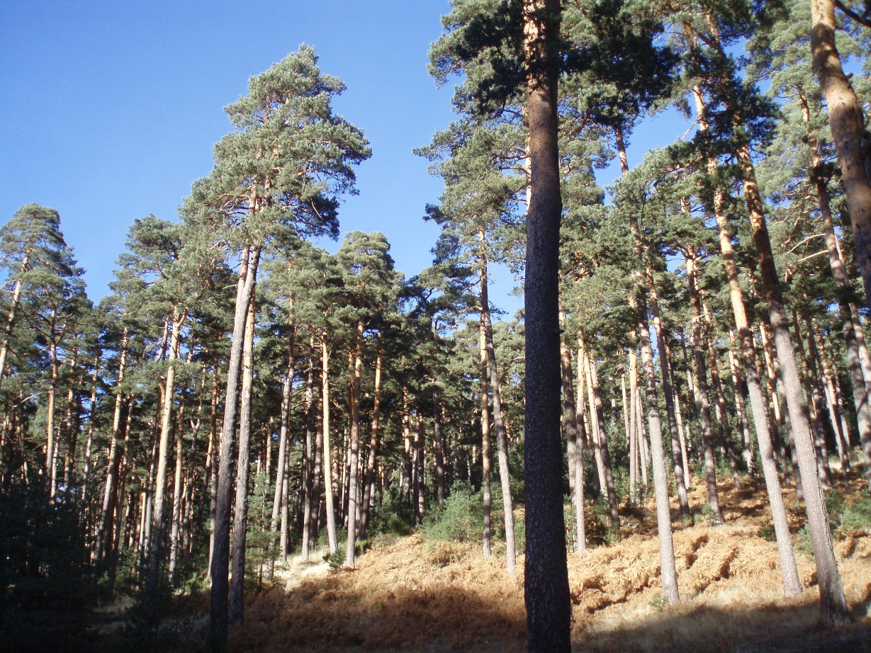 Pinar (Pinus sylvestris) del Valle de Valsaín (España).